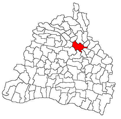 Craiova localization in Dolj county